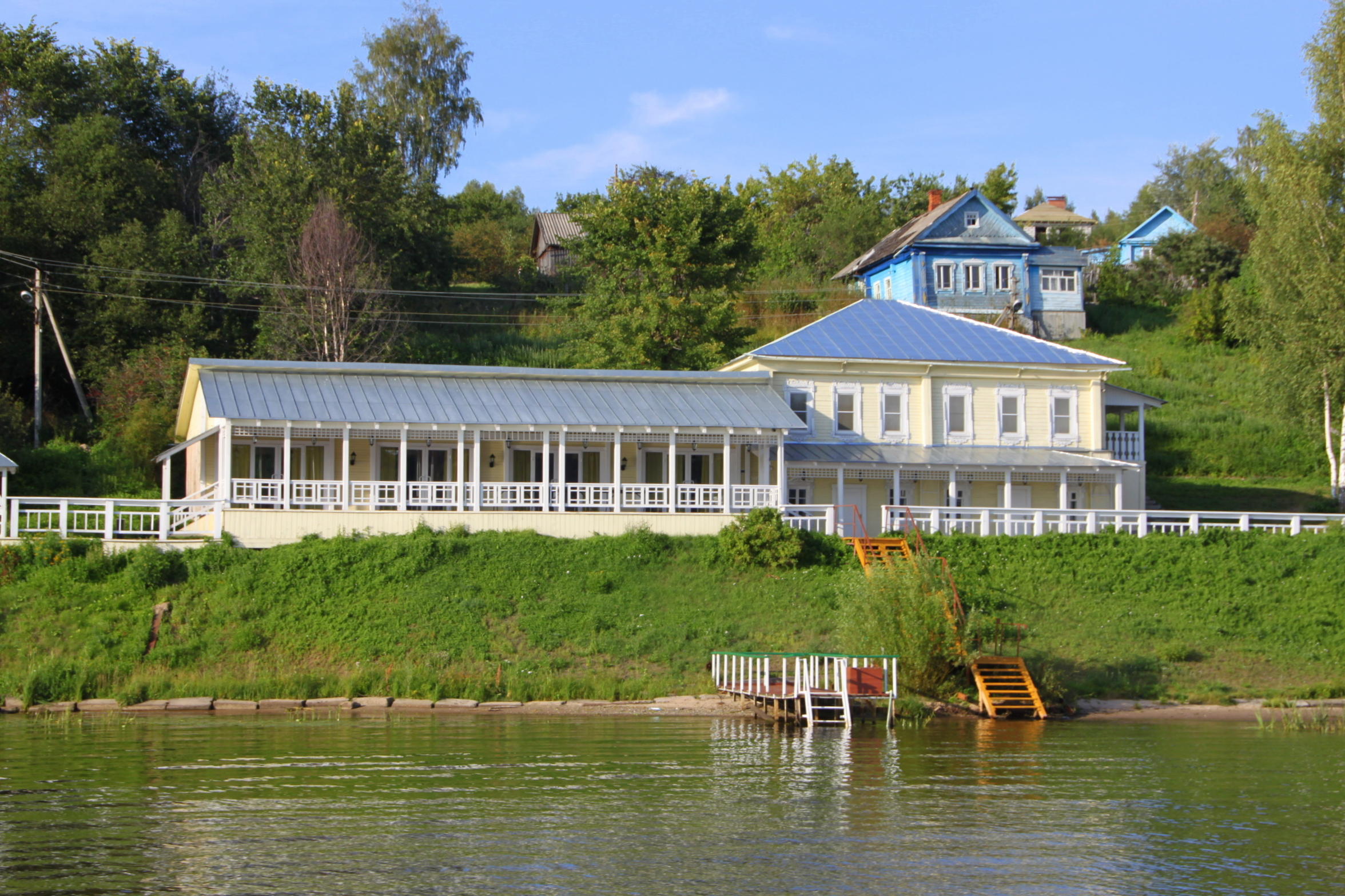 Krasnoselsky District, Kostroma Oblast, Russia